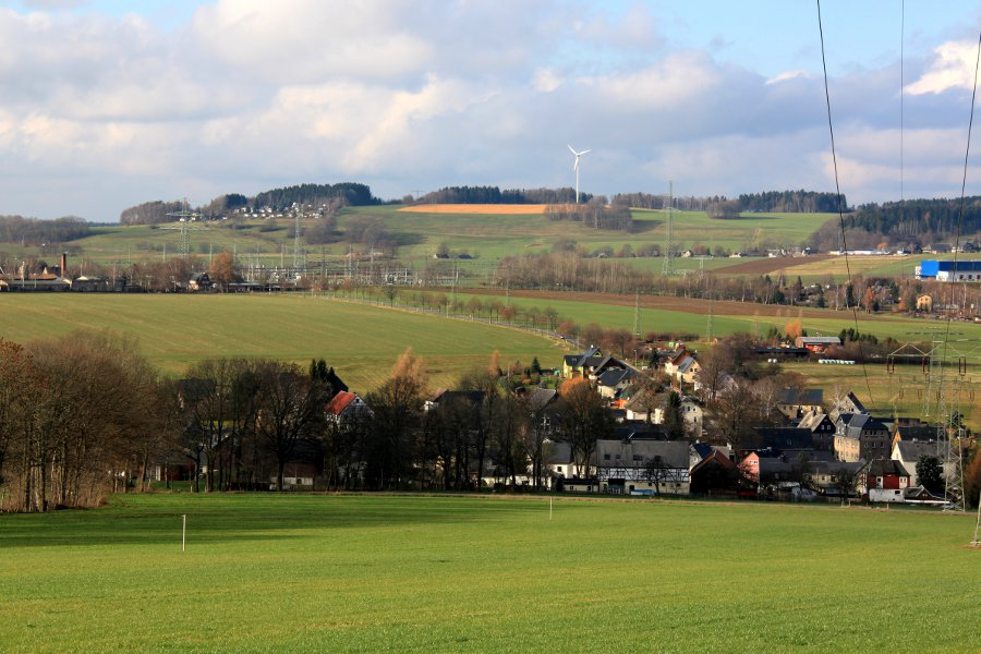 Blick auf Kühnhaide, hinten links Umspannwerk Zwönitz